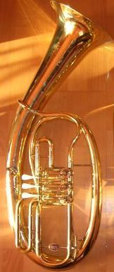 Tenorhorn der Marke B&S